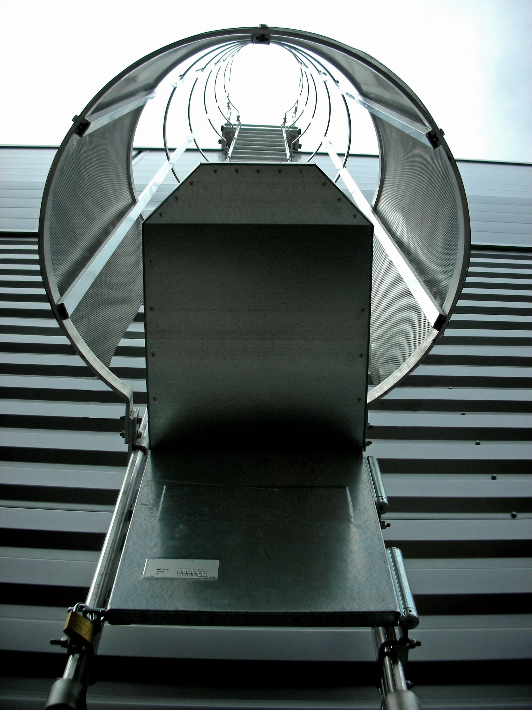 Échelle crinoline acbi aluminium avec panneau d'accès pivotant